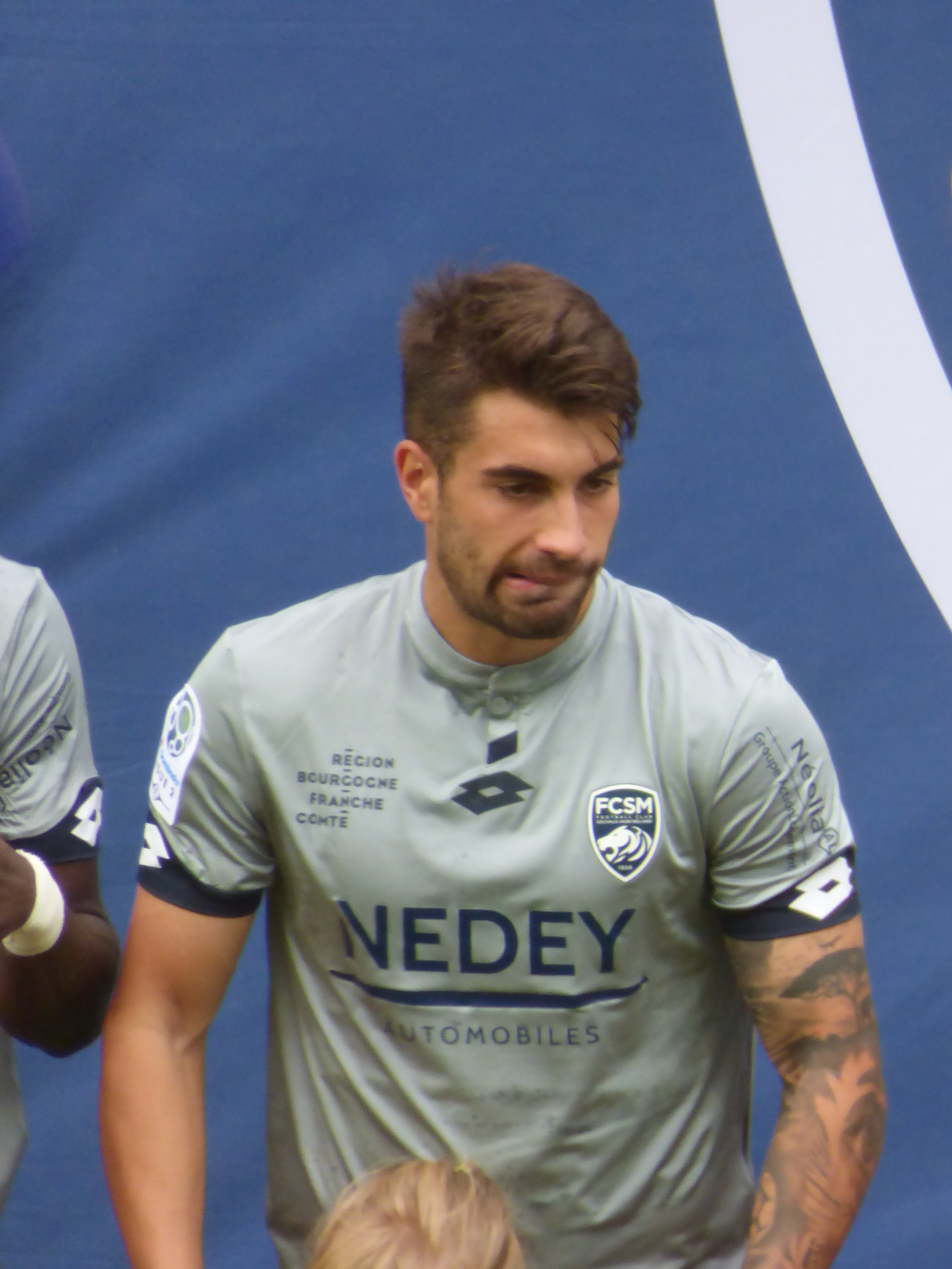 Josema avant le match Lens / Sochaux, comptant pour la septième journée du championnat de France de football de Ligue 2, le 15 septembre 2018.